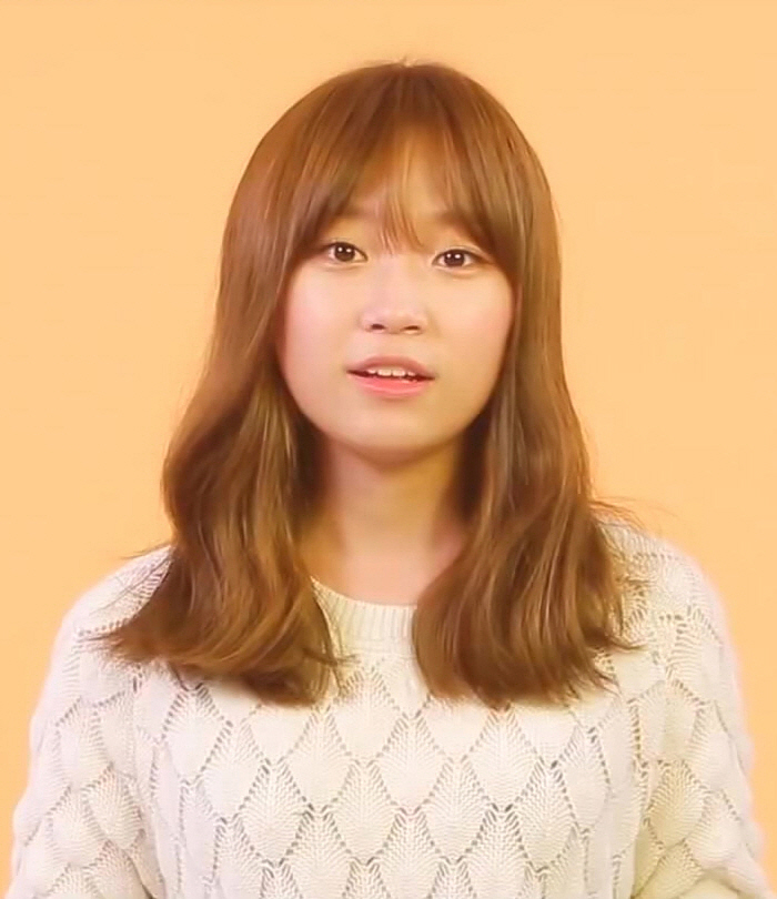 (몽키3뮤직 스타모닝콜) 김슬기